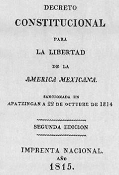 Constitución de 1814 de apatzingan